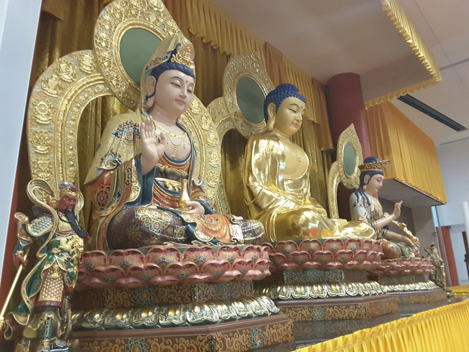 Biara Buddha baru di Singapura.